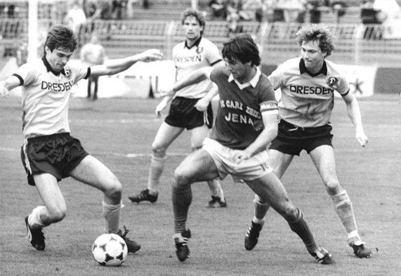 ADN-ZB-Häßler -10.5.86-pe-Dresden: Fußball-Oberliga- Dynamo Dresden - FC Carl Zeiss Jena 0:0- In dieser Szene kämpfen Dirk Lozert (l.) aus Dresden und Matthias Dözchner (r.) von derselben Mannschaft um den Ball mit dem Jenaer Jürgen Paab.